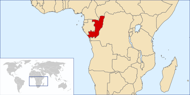 (en) World Map (pt) Mapa Mundo (de) Weltkarte (sv) Världskarta